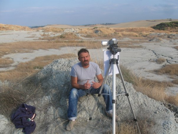 Simone Casati durante le riprese del video sul Chlamydoselachus lawleyi.